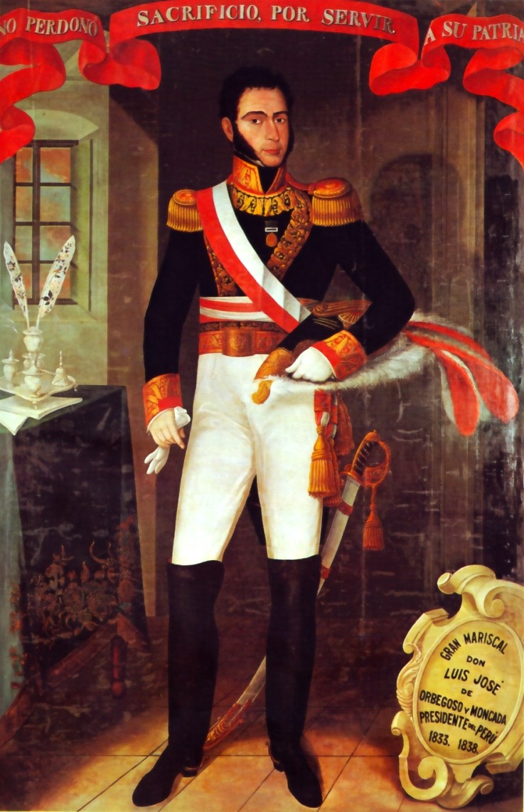 Luis José de Orbegoso y Moncada Galindo, (1795 - 1847). Militar y político peruano. Presidente Constitucional del Perú de 1833 a 1836.